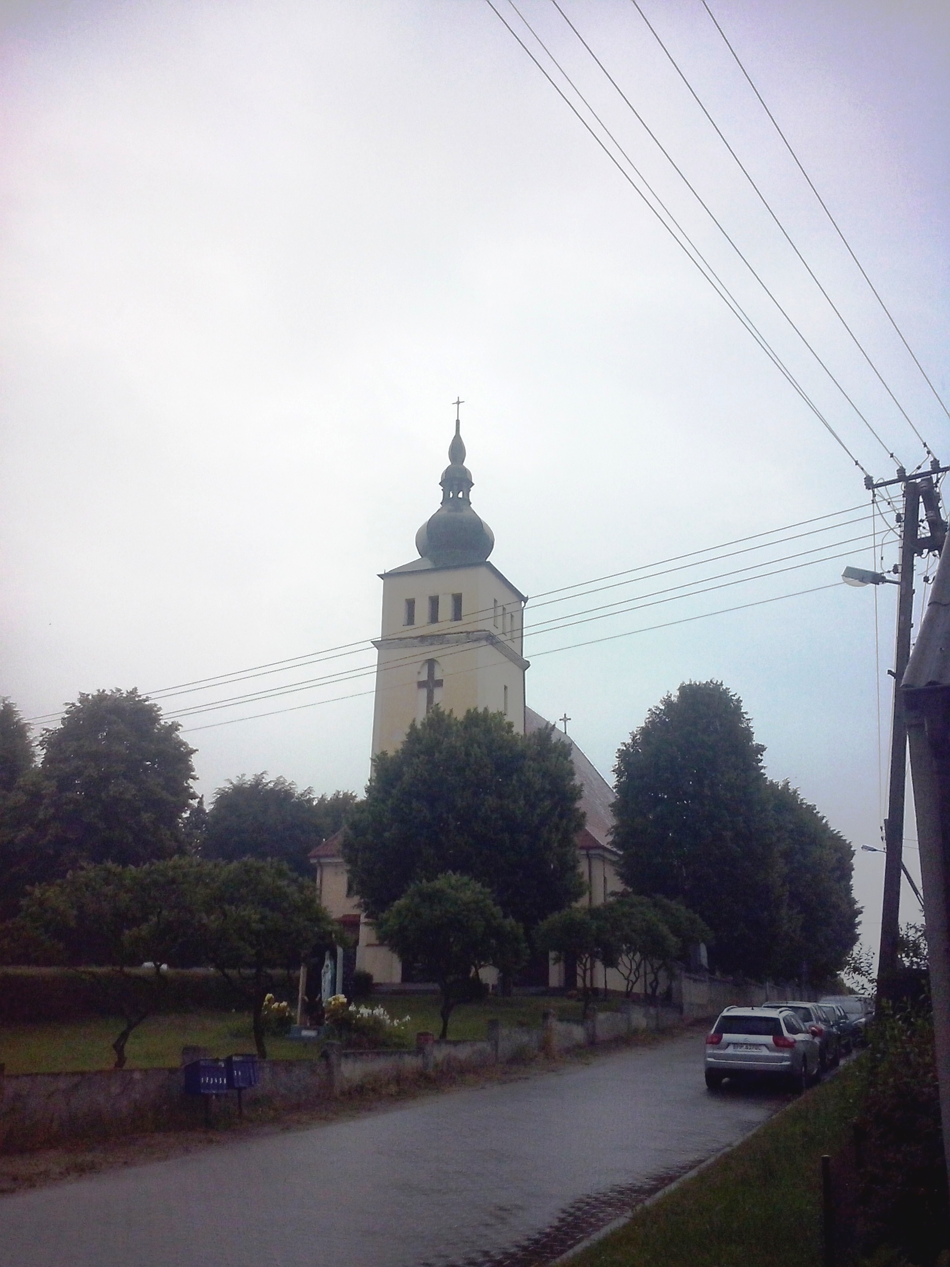 Białośliwie (gm. Białośliwie, pow. Piła) - kościół Najświętszego Serca Pana Jezusa (diecezja bydgoska)